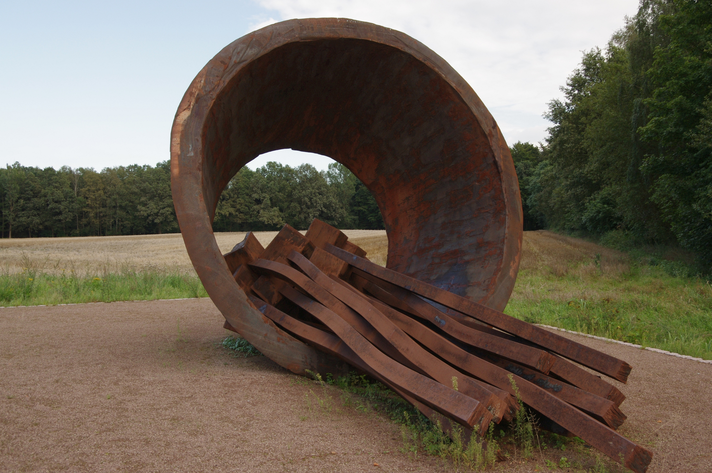 Laderampe Bergen-Belsen. Objekt Rampe Bergen-Belsen, von a. und h.j. breuste, 2007